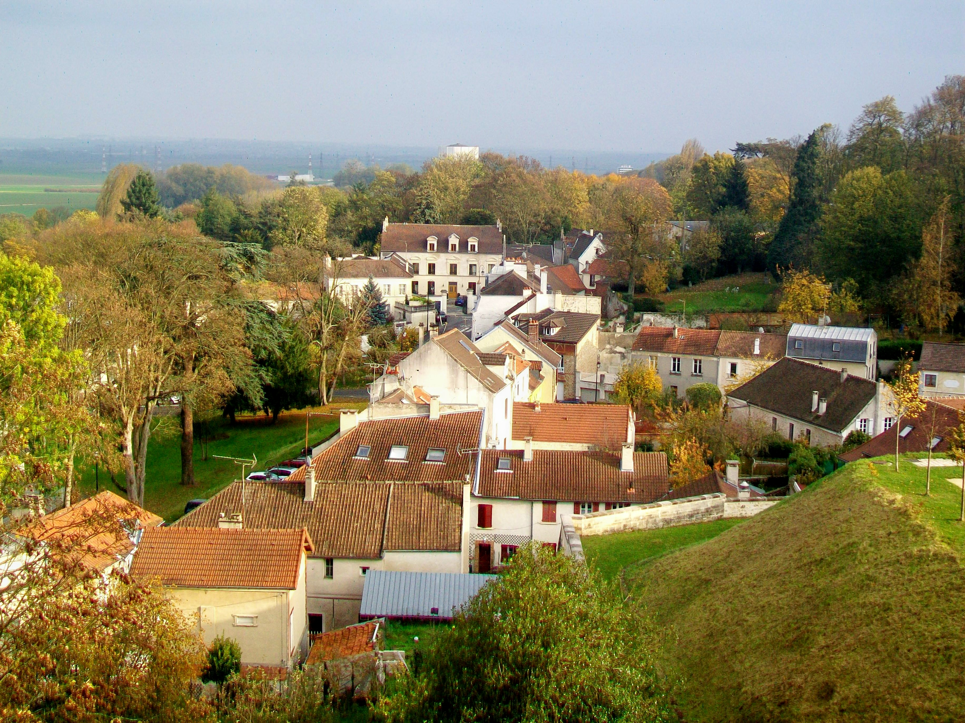 Vue sur l'est du vieux village depuis le second étage du château.